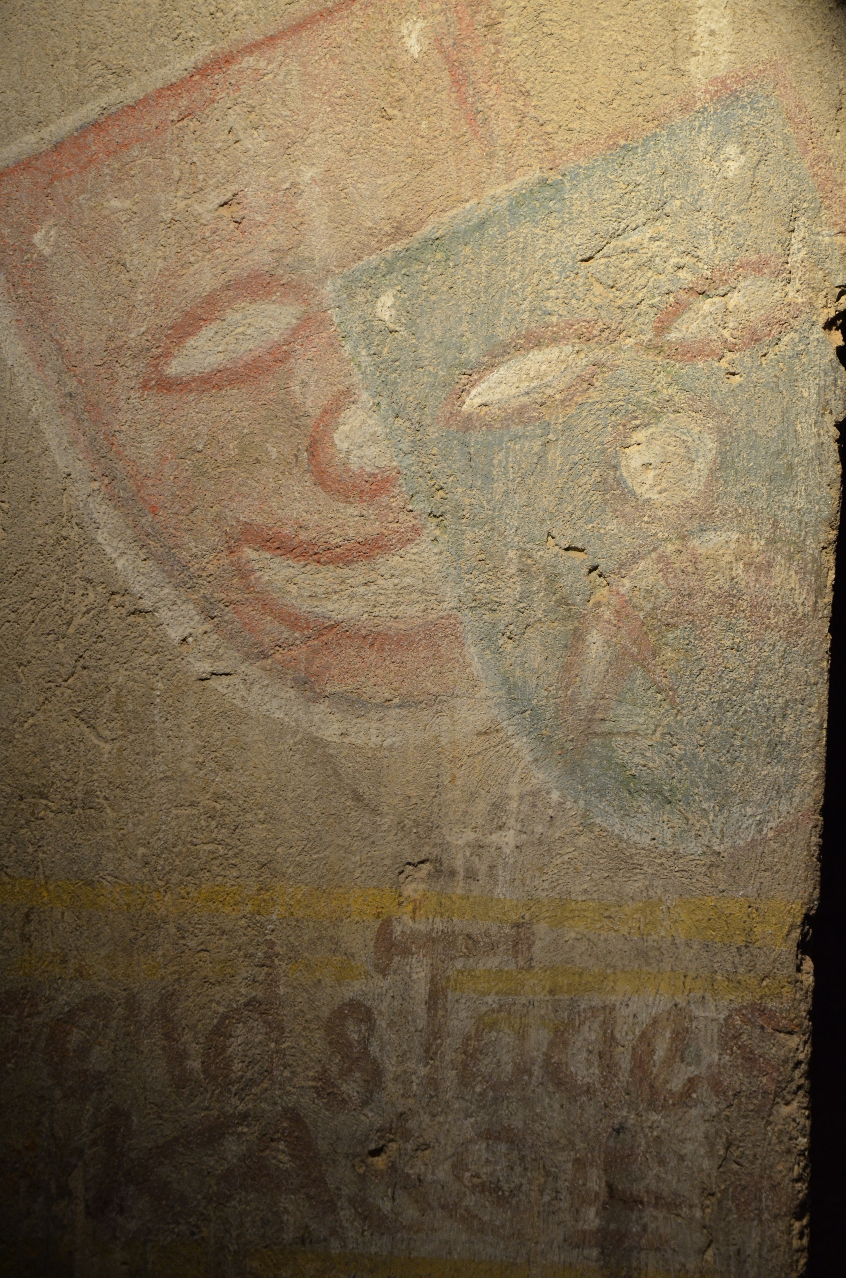 Masques tragi-comiques au camp des Milles